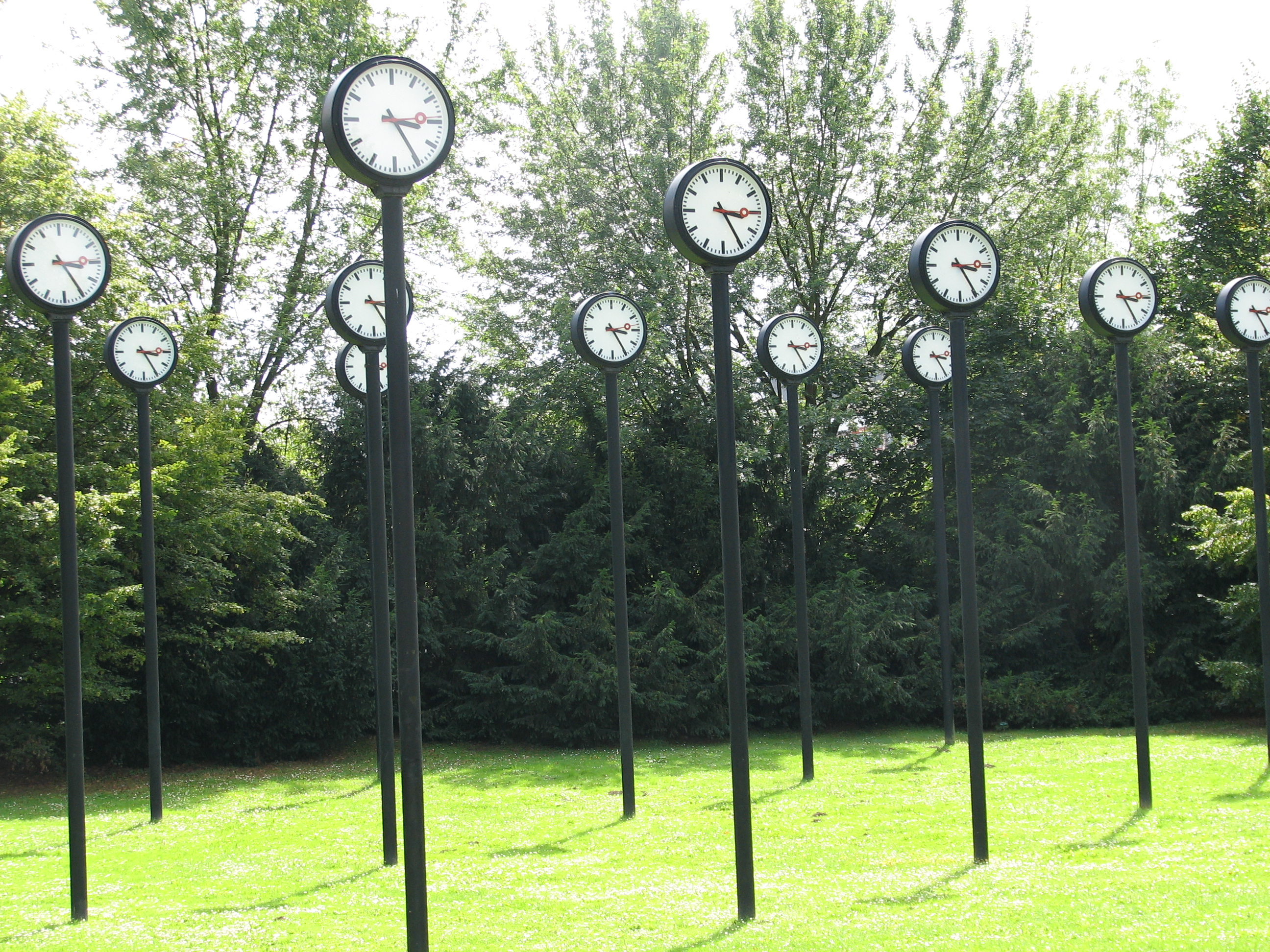 3:25 p.m /15:25 Uhr